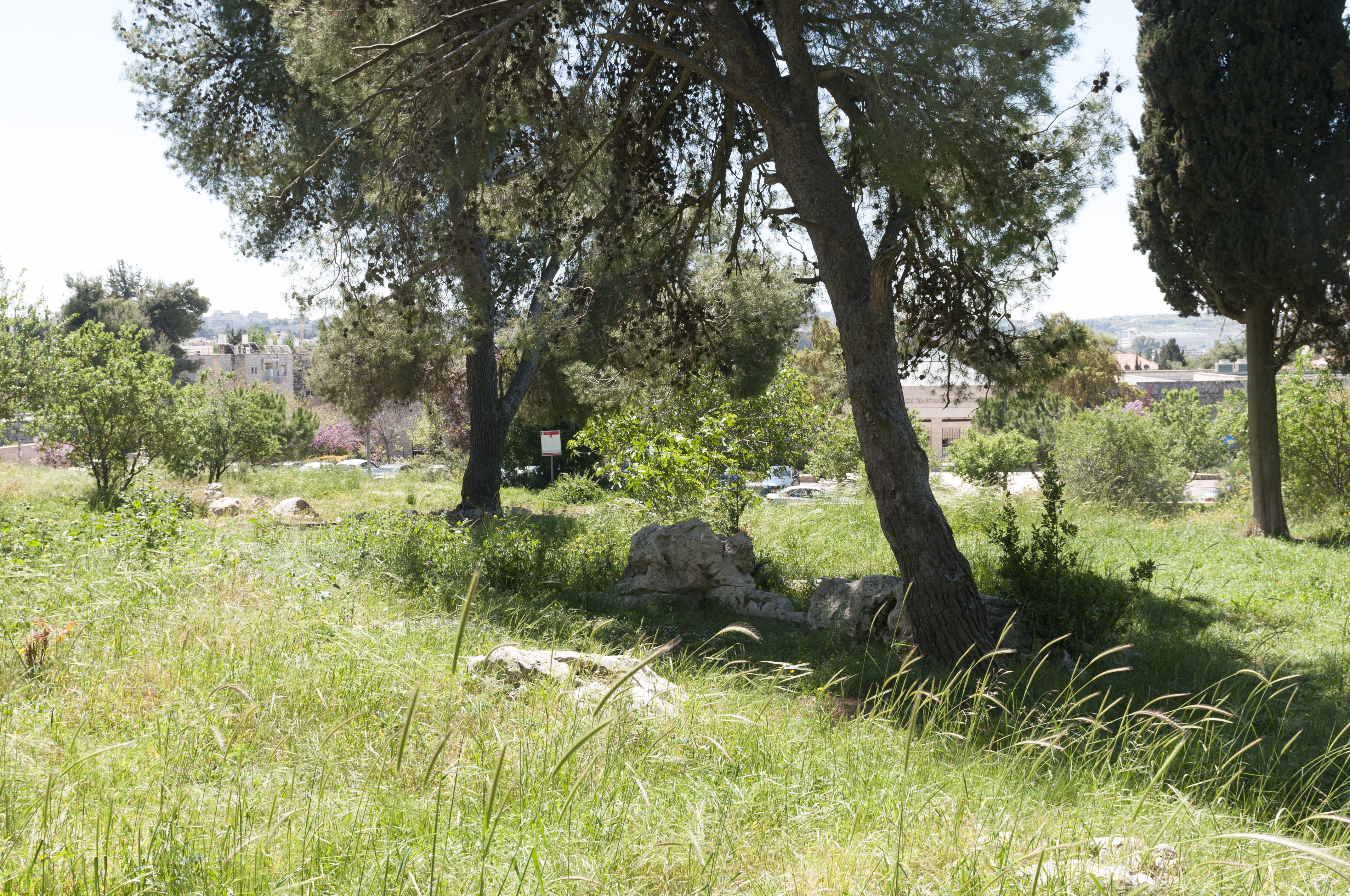 Hackathon 2016, Hansen Hospital Jerusalem